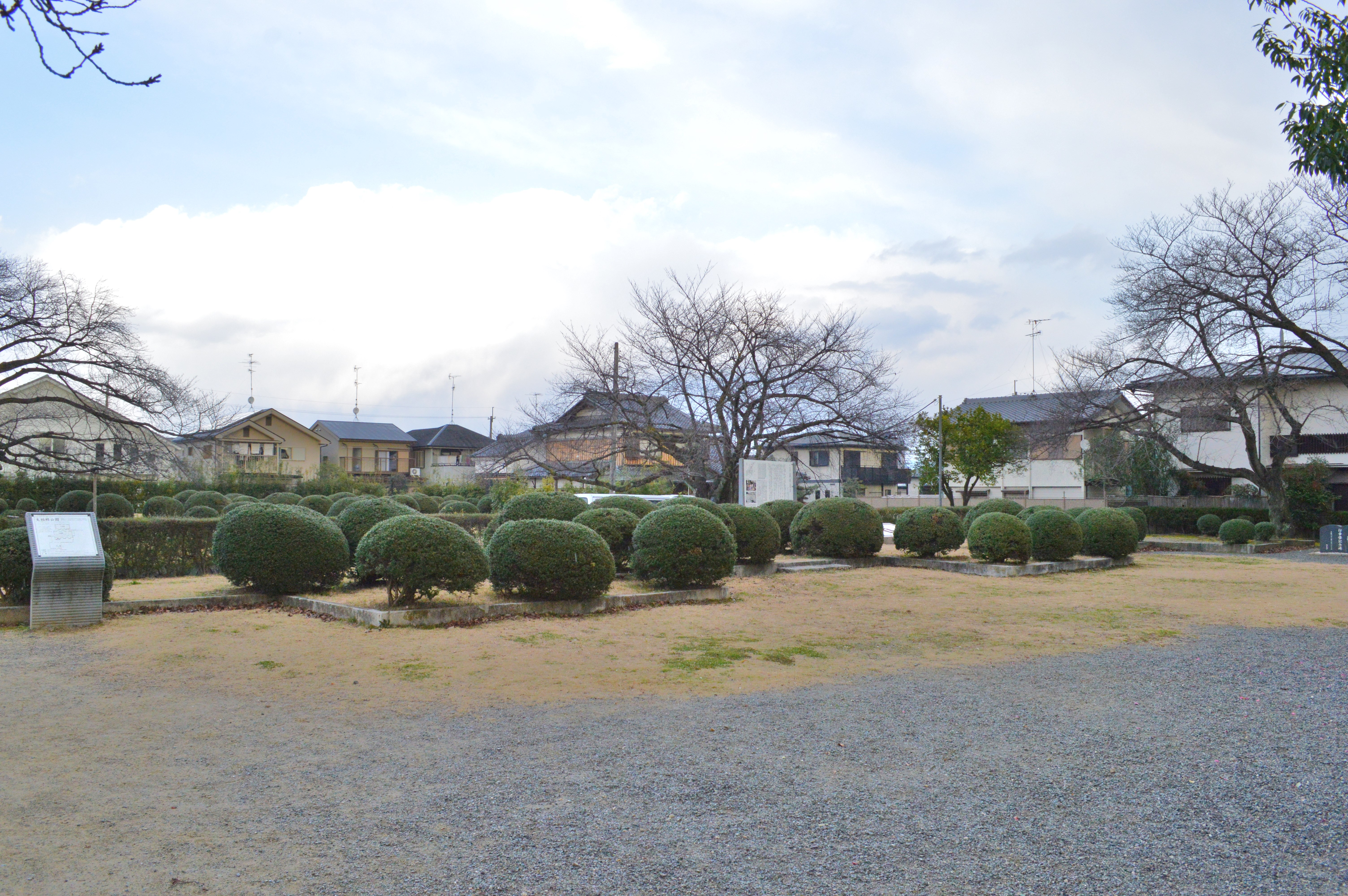 長岡宮跡 大極殿